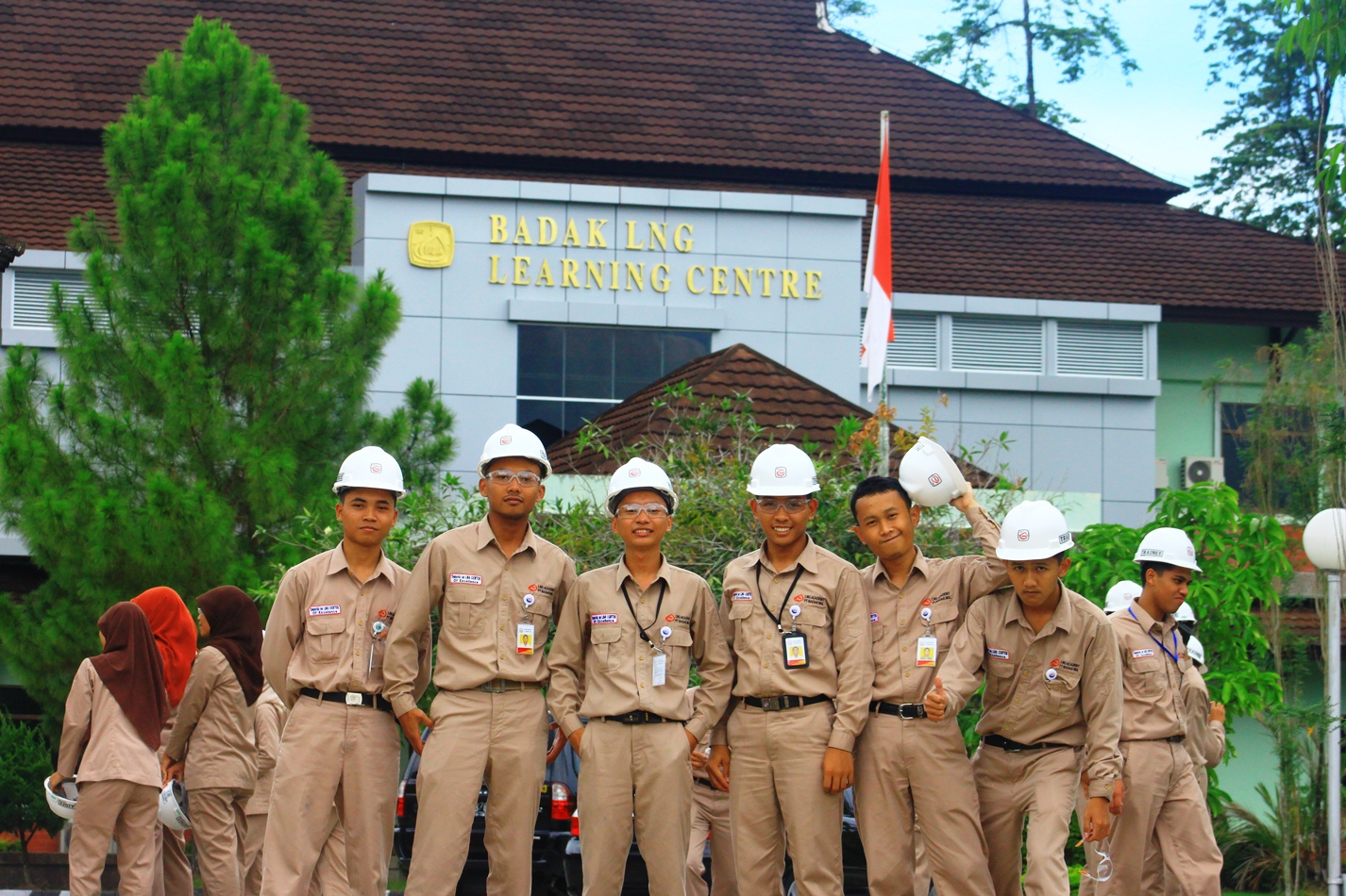 Badak LNG Learning Centre yang sekaligus kampus LNG Academy